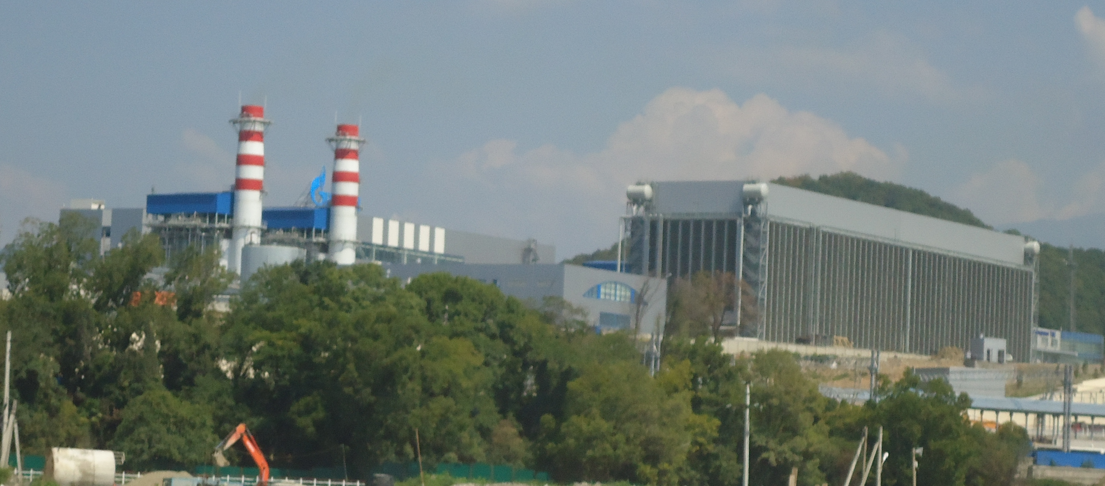 Адлерская теплоэлектростанция, построенная к Олимпиаде в Сочи